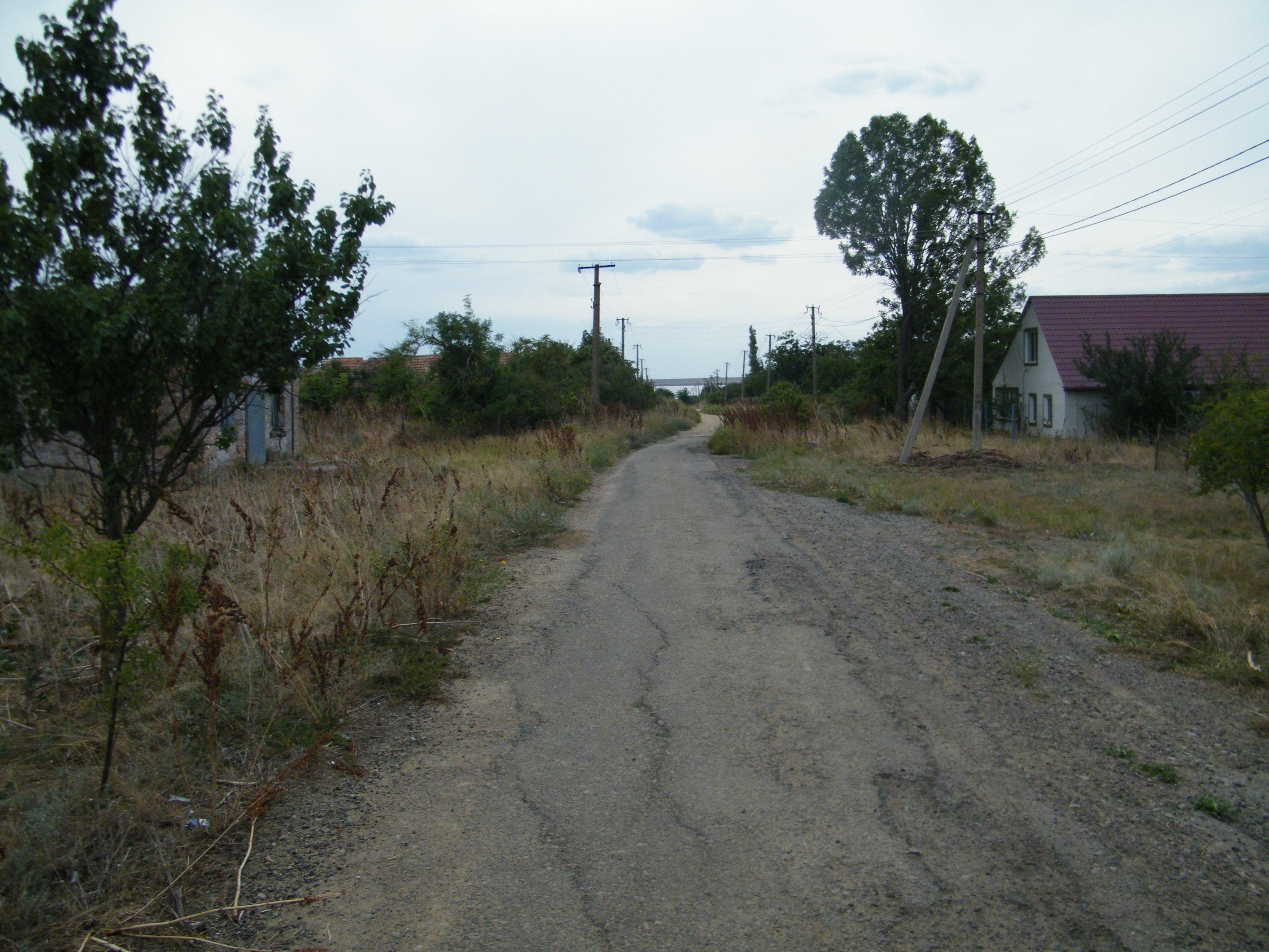 Осетрівка